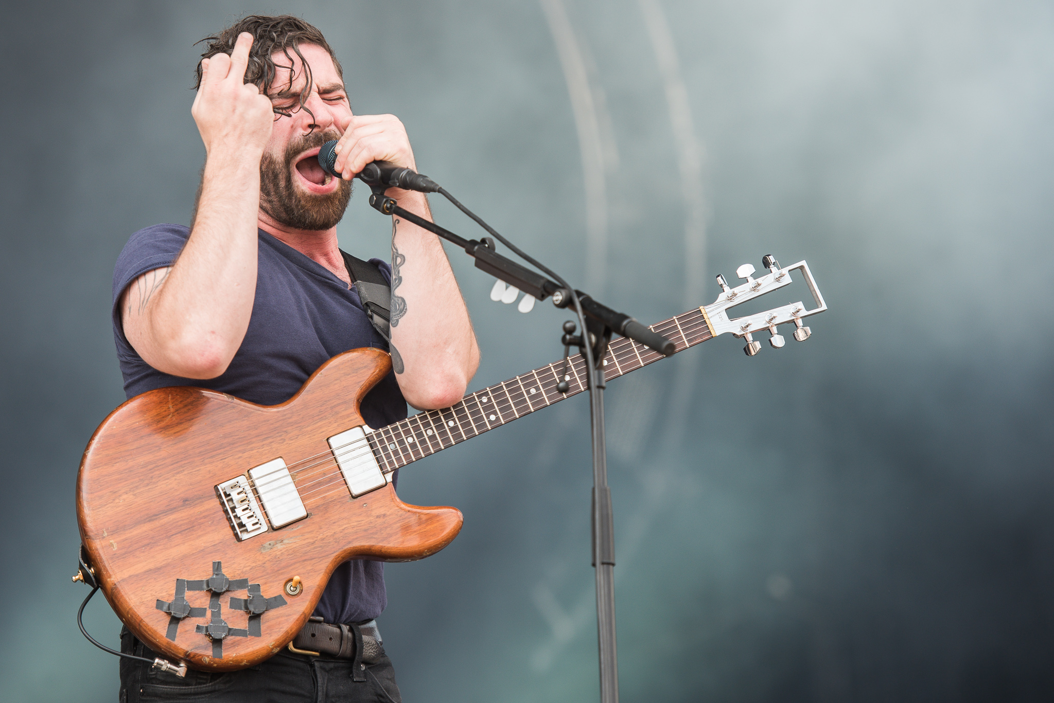 ARGO-Konzerte,Festival,Foals,Konzert,Livekonzert,Livemusik,Musik,RiP,Rock im Park 2016,Seat Zeppelin Stage,Yannis Philippakis